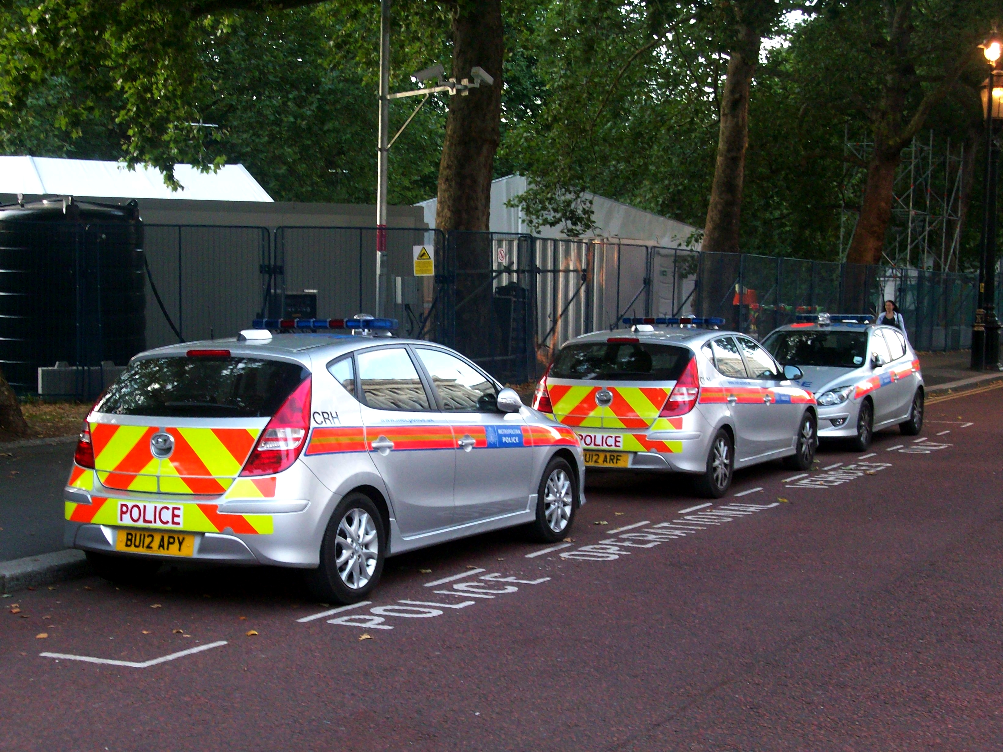 Voitures de police Hyundai à Londres